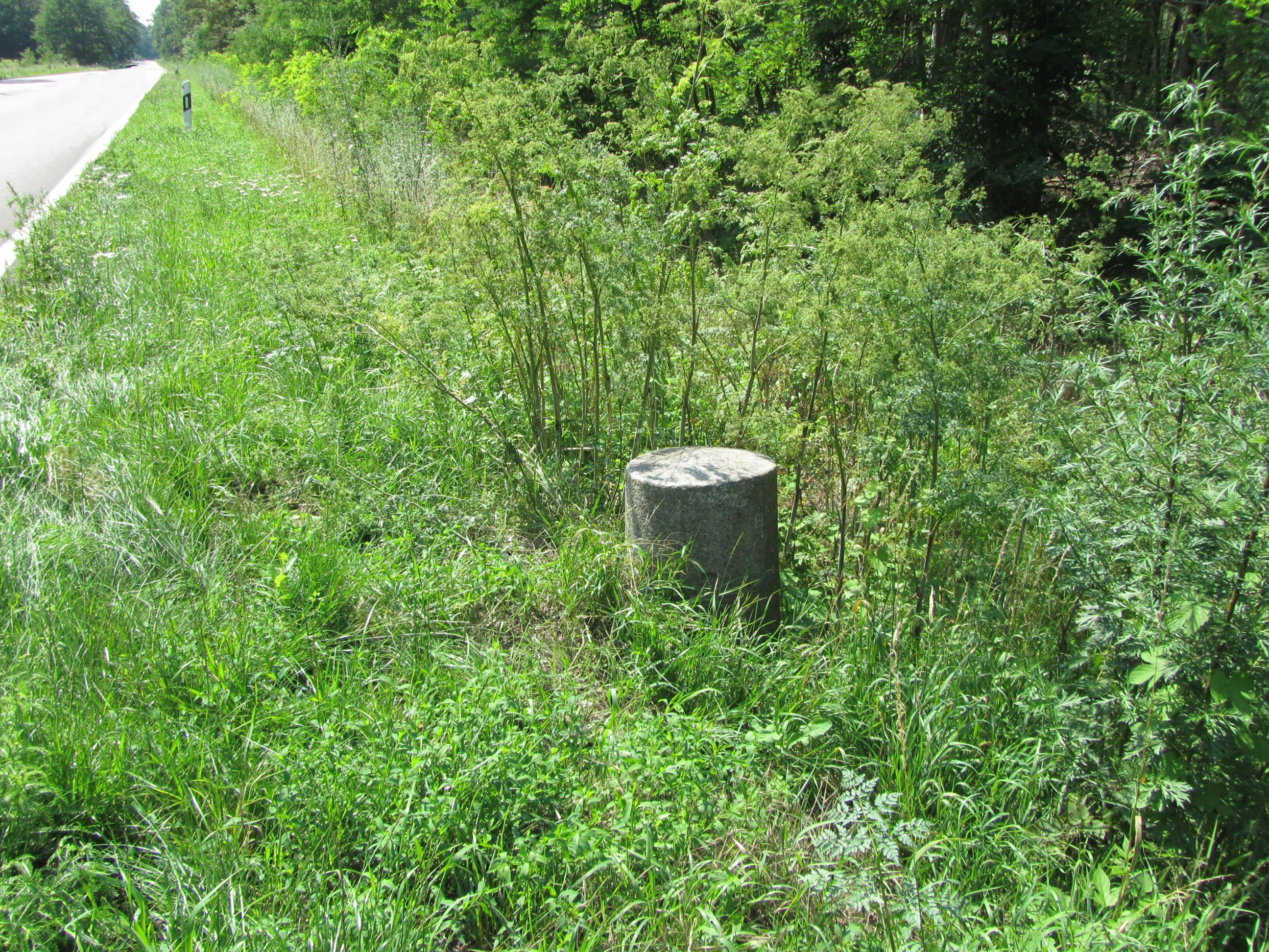 Anhaltischer Meilensten zwischen Roßlau und Klieken an der B187